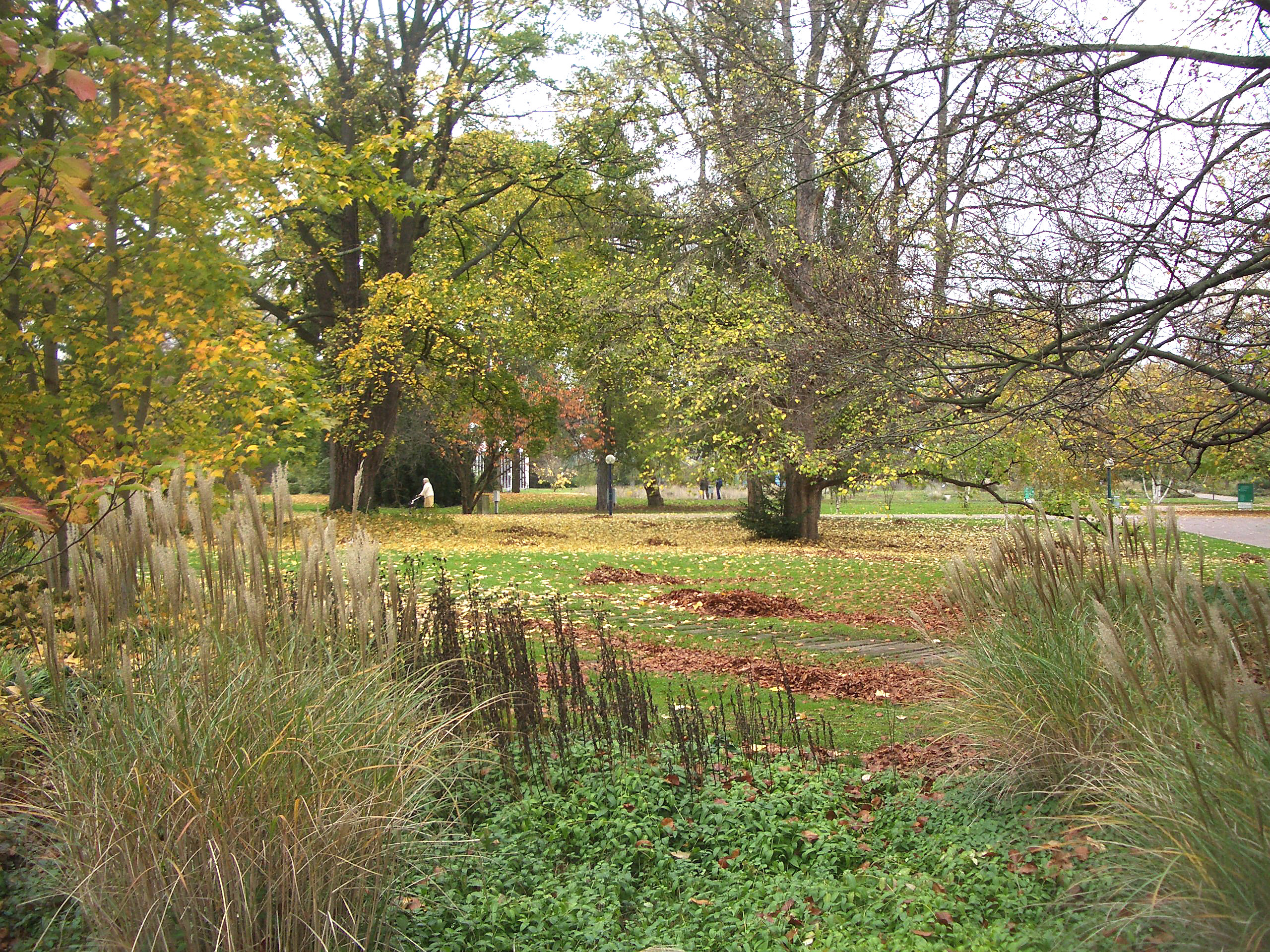 Frankfurt am Main, Germany: Palmengarten im Herbst